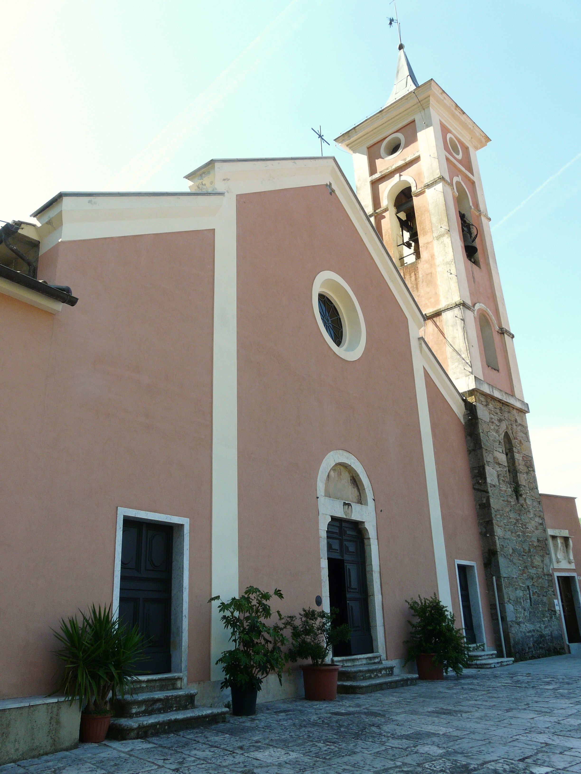 Chiesa di San Geminiano, Antona, Massa, Toscana, Italia